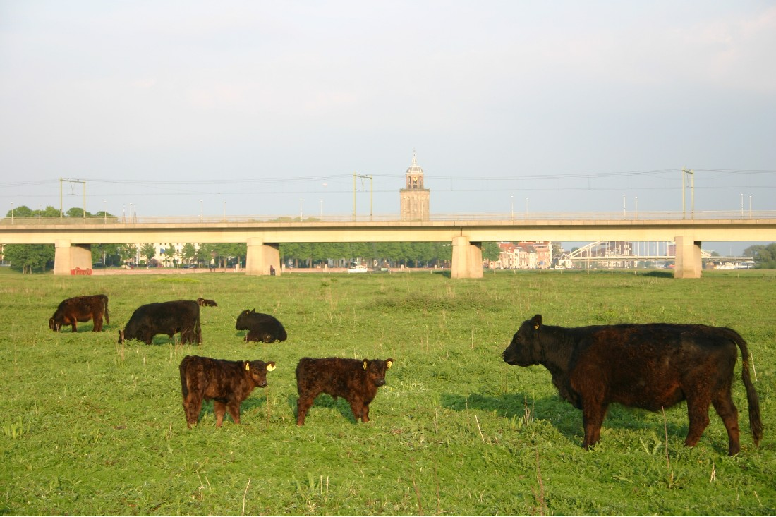 Eigen foto van spoorbrug over IJssel bij Deventer